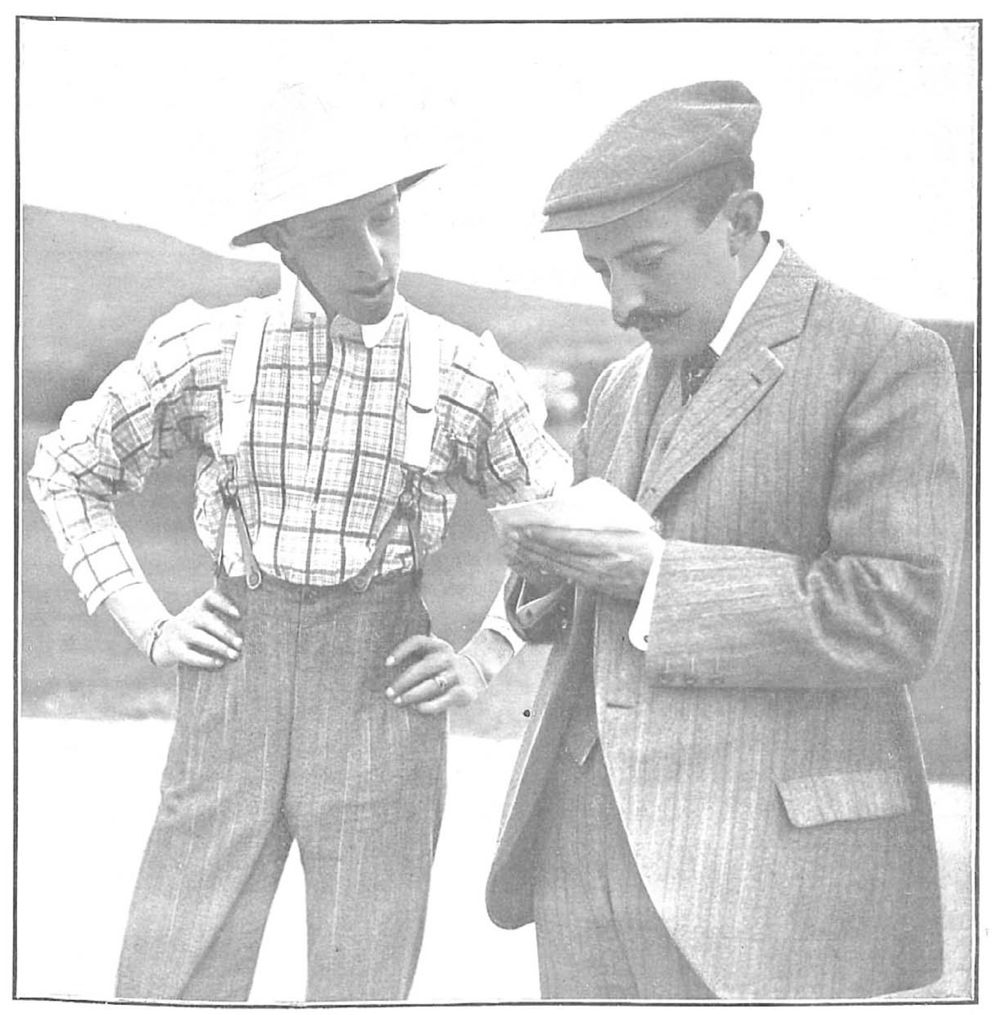 Alfonso XIII jugando al golf. Acompañado de Francisco Barber.